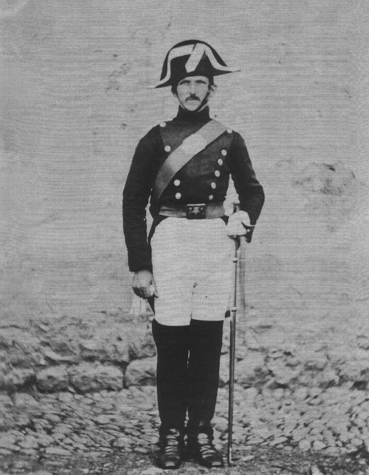 Positivo sobre cartulina - reportaje fotográfico sobre la construcción del ferrocarril de Santander a Alar del Rey (Palencia)